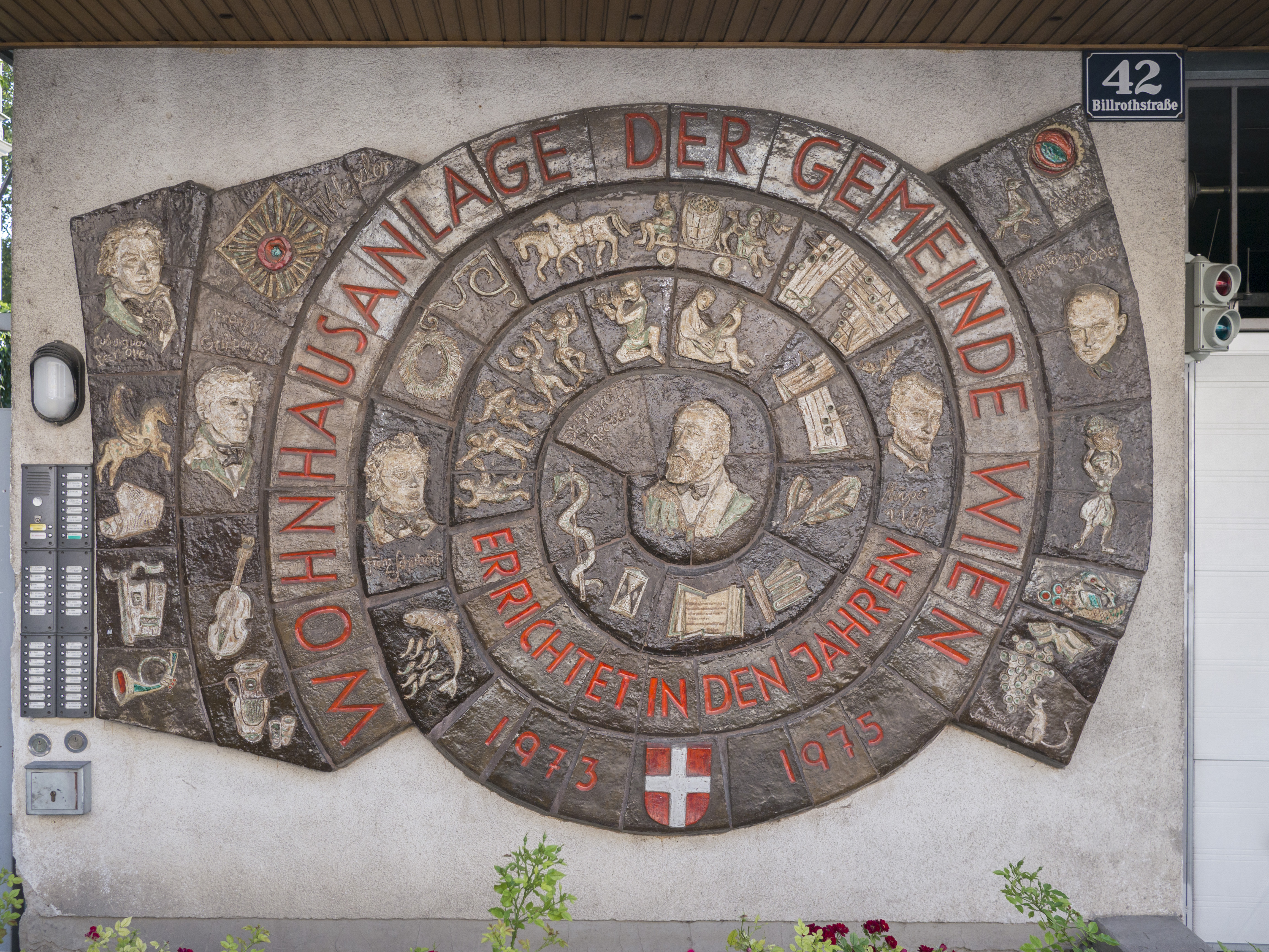 Billrothstraße 42 Kunst am Bau; Trude Diener-Hillinger; Döblinger Sonnenrad